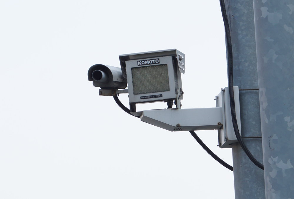 高雄市自動車牌辨識系統。